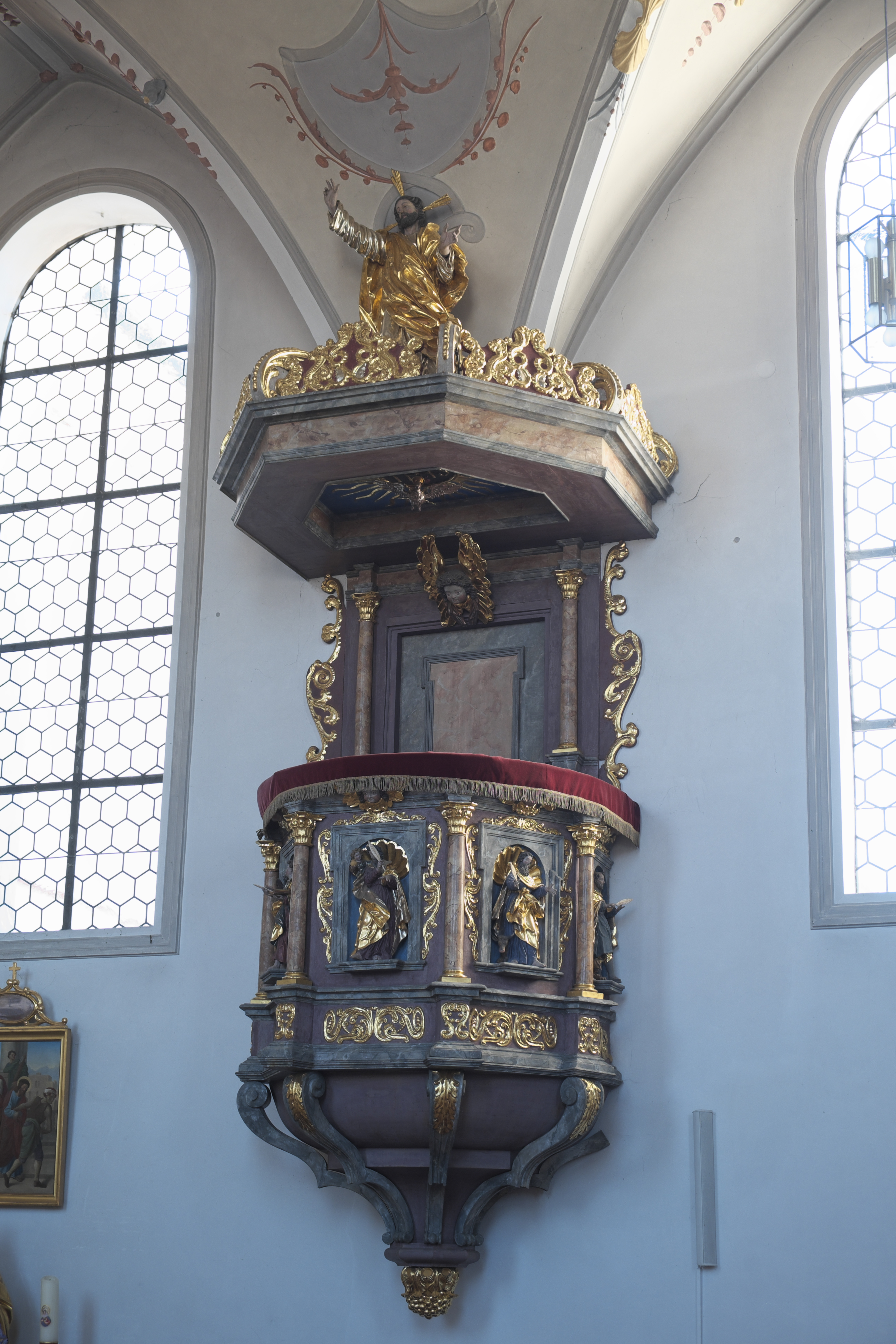 Katholische Pfarrkirche St. Stephan in Kissing im scchwäbischen Landkreis Aichach-Friedberg (Bayern/Deutschland), Kanzel, um 1680